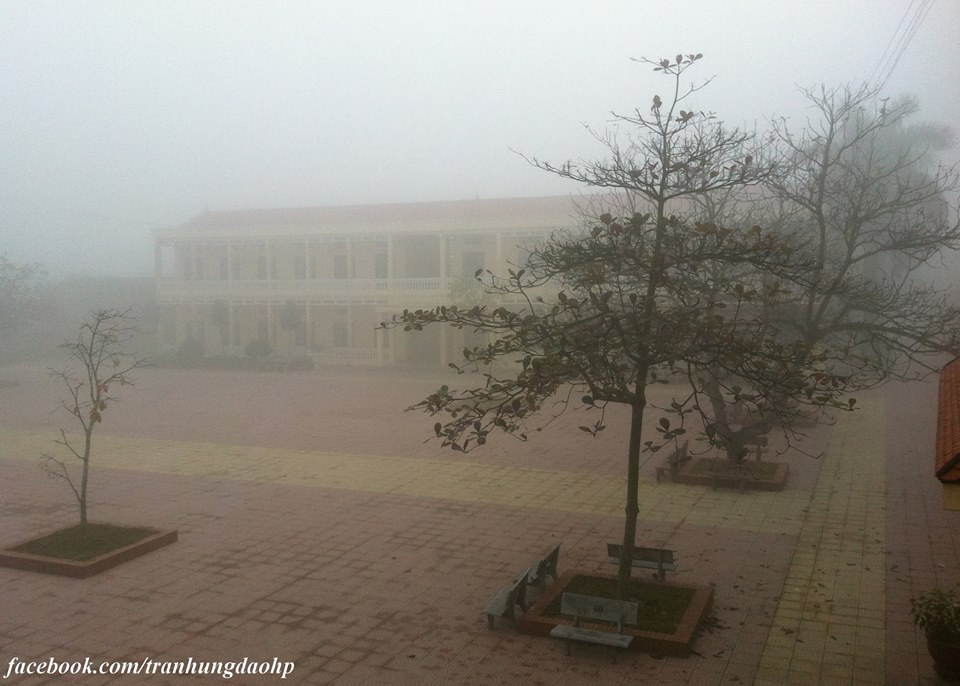 Ảnh Trường THPT Trần Hưng Đạo, Hải Phòng vào sáng mùa đông.